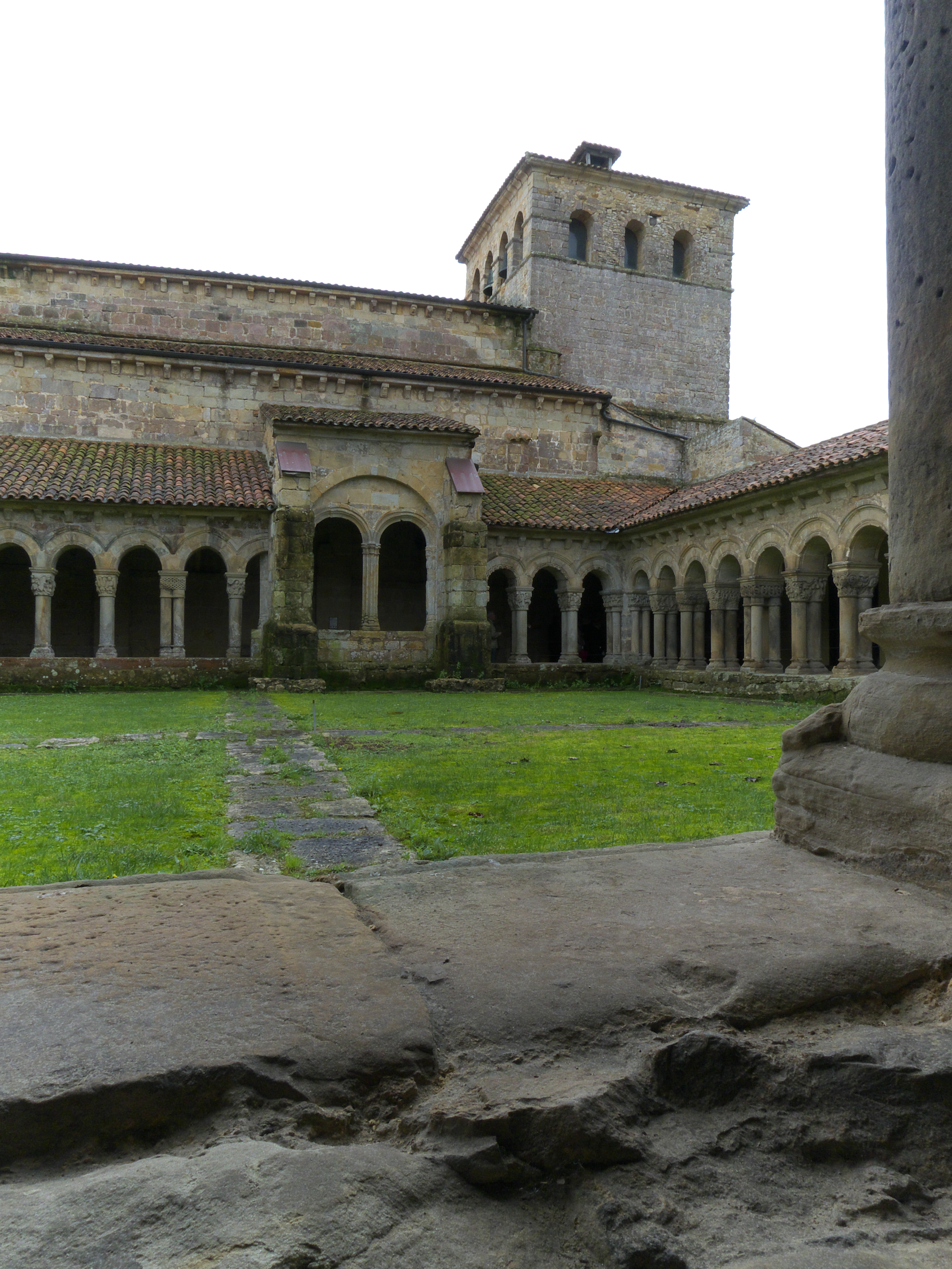 En el siglo XIII se detectan problemas de cimentación, por lo que deciden eliminar la fachada de poniente y su portada, sustituyéndola por una potente torre-campanario.